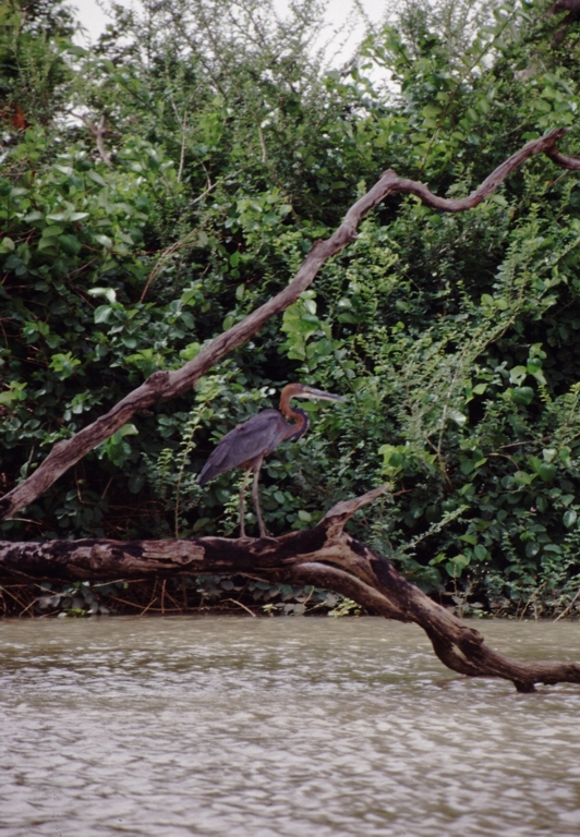 Bootstour auf dem Gambia River bei Janjanbureh Island (McCarty Island) hier wird der Fluß von Galeriewald gesäumt; Goliathreiher (Ardea goliath)